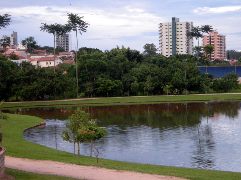 Parque do Araçariguama, em Santa Bárbara d'Oeste, SP.